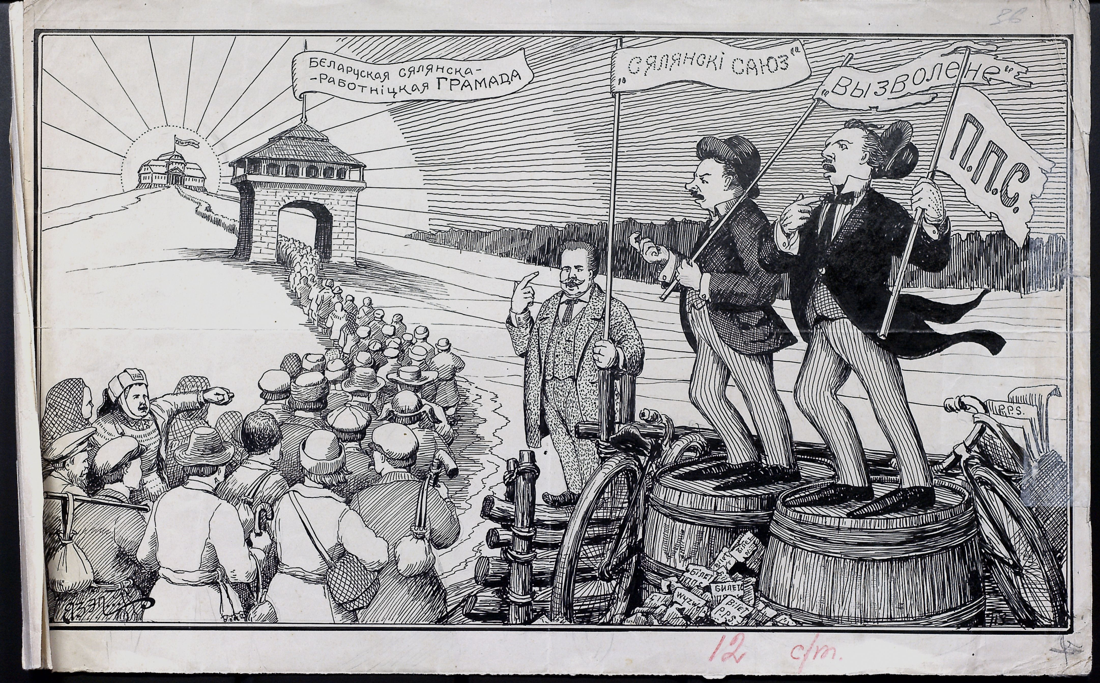 Плакат-карыкатура з часопіса Маланка 1926г. Беларуская (тарашкевіца): Плякат-карыкатура з часопісу Маланка 1926г.